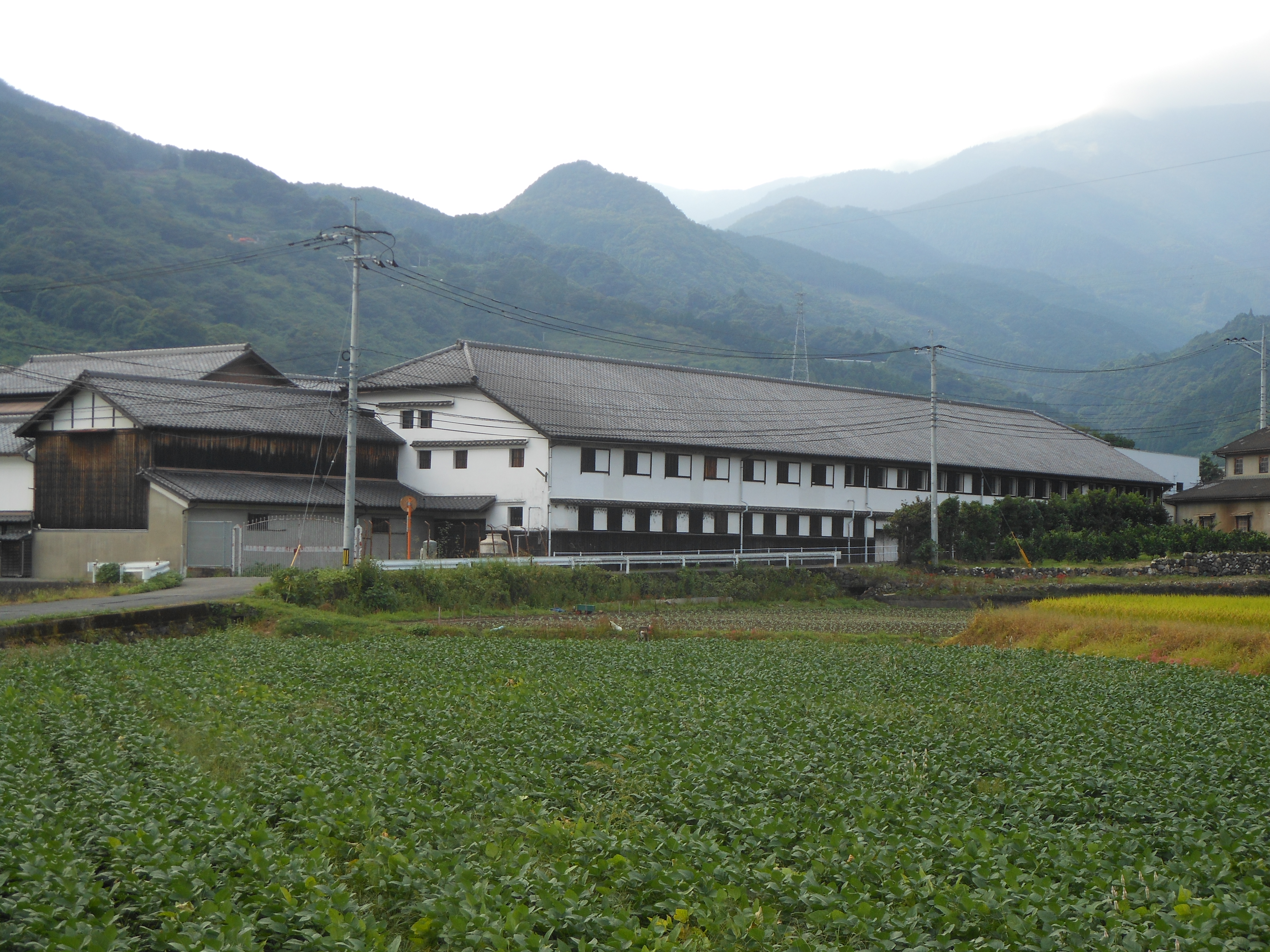 佐賀県小城市小城町岩蔵にある天山酒造の酒蔵。登録有形文化財及び「22世紀に残す佐賀県遺産」に登録されている。